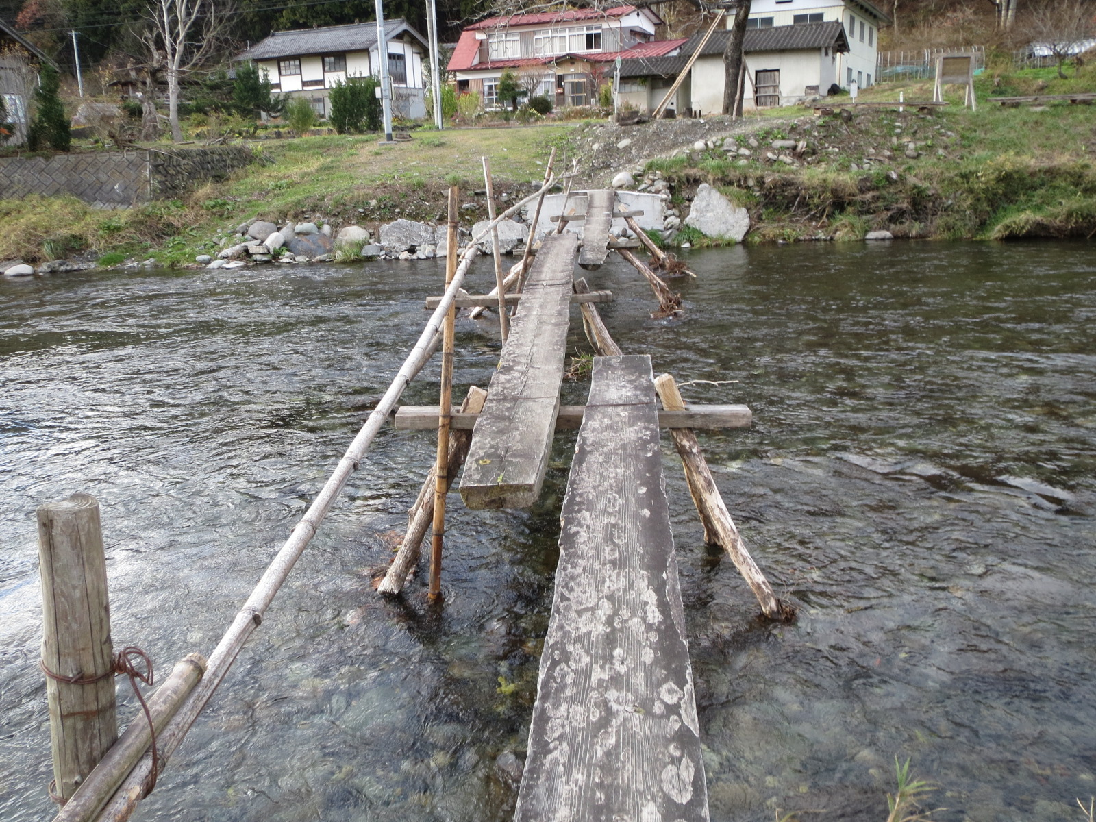 松日橋を右岸側から撮影